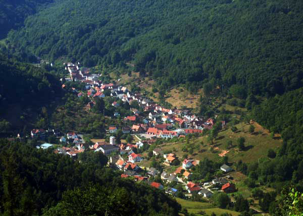 (Gemeinde Ramberg. Aufgenommen Sommer 2004) Fotograf oder Zeichner: Andre Brück (für die GNU-FDL)